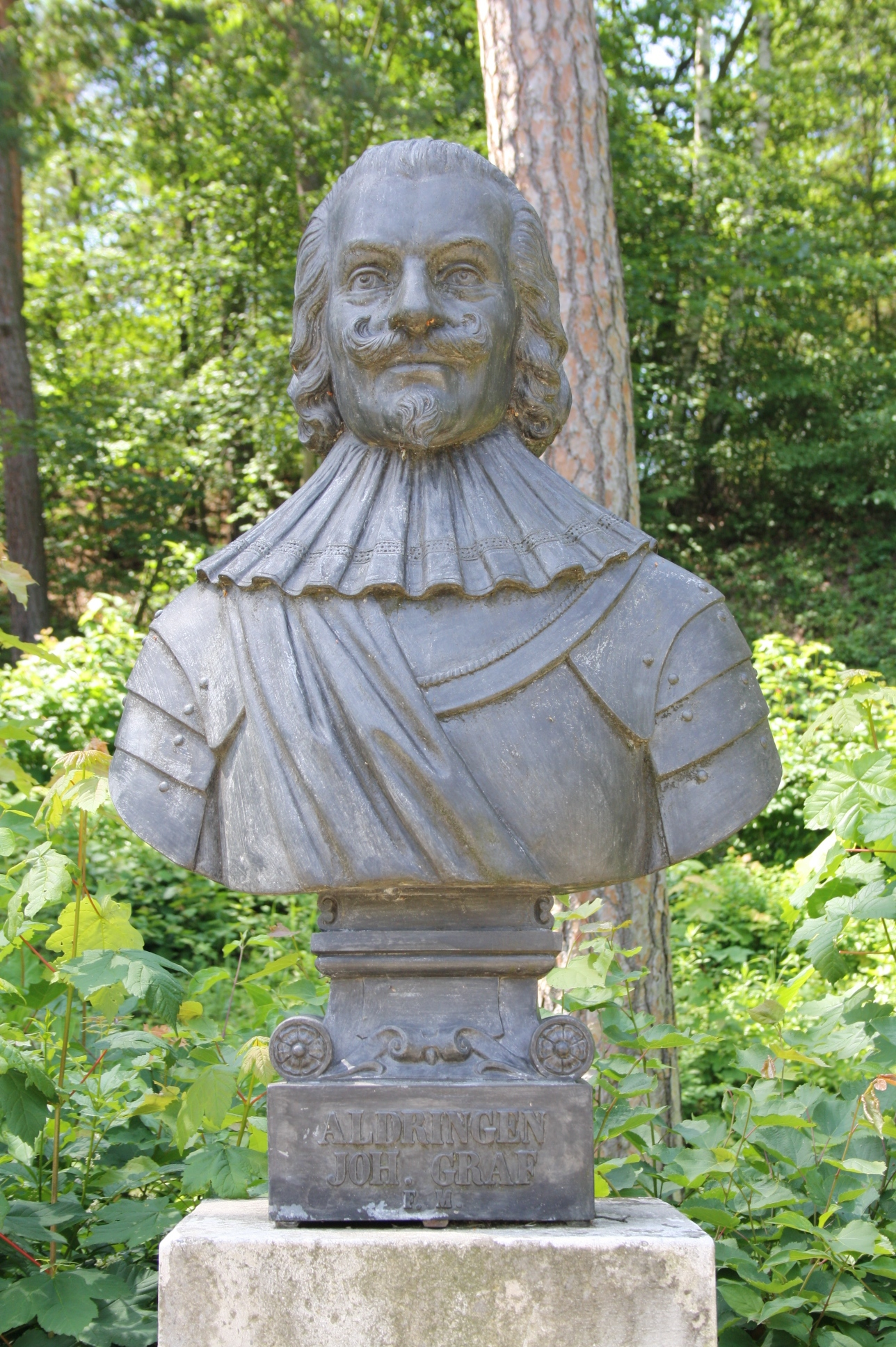 Büste in der Gedenkstätte Heldenberg (Niederösterreich)